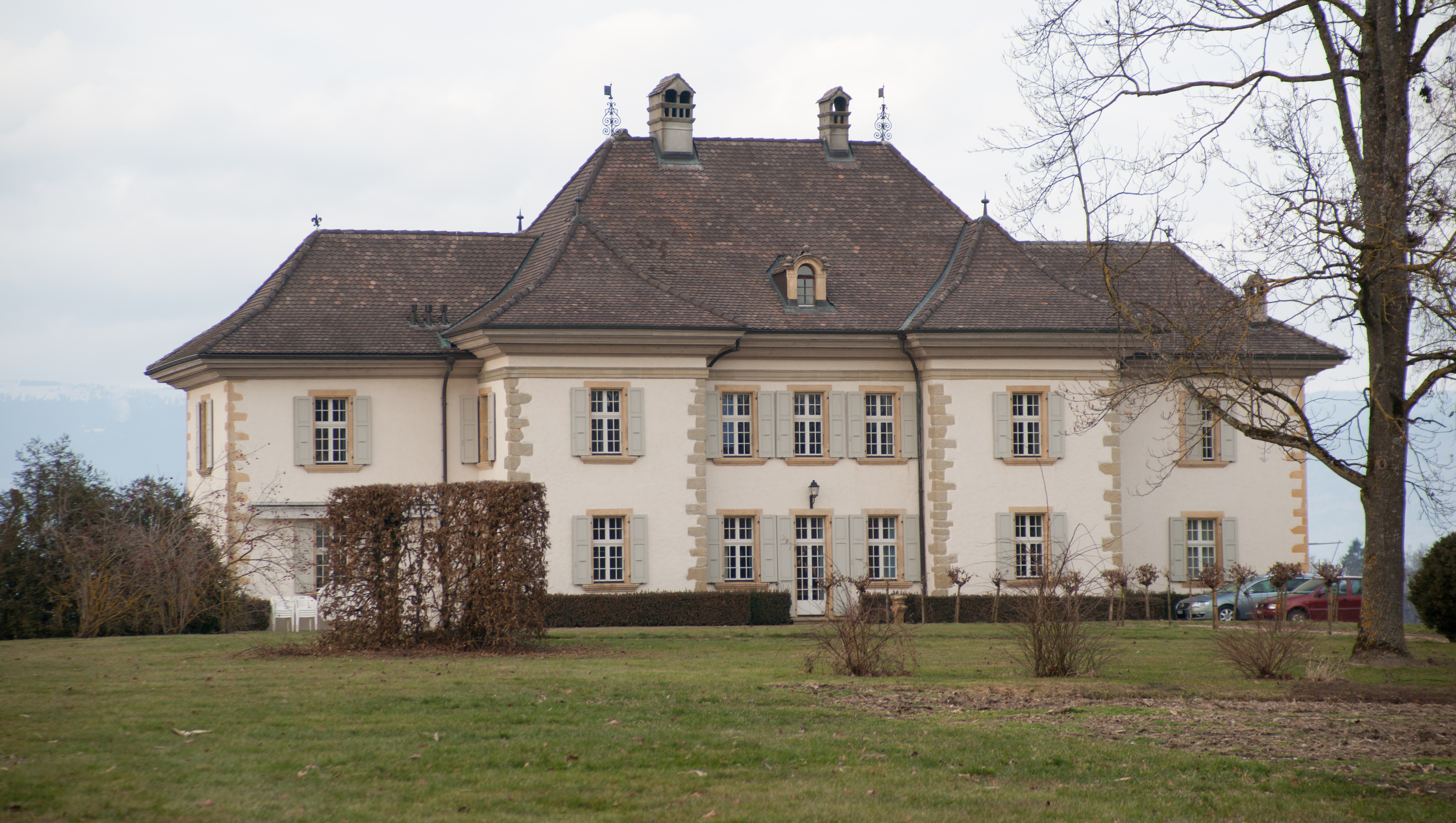 Château de Castella